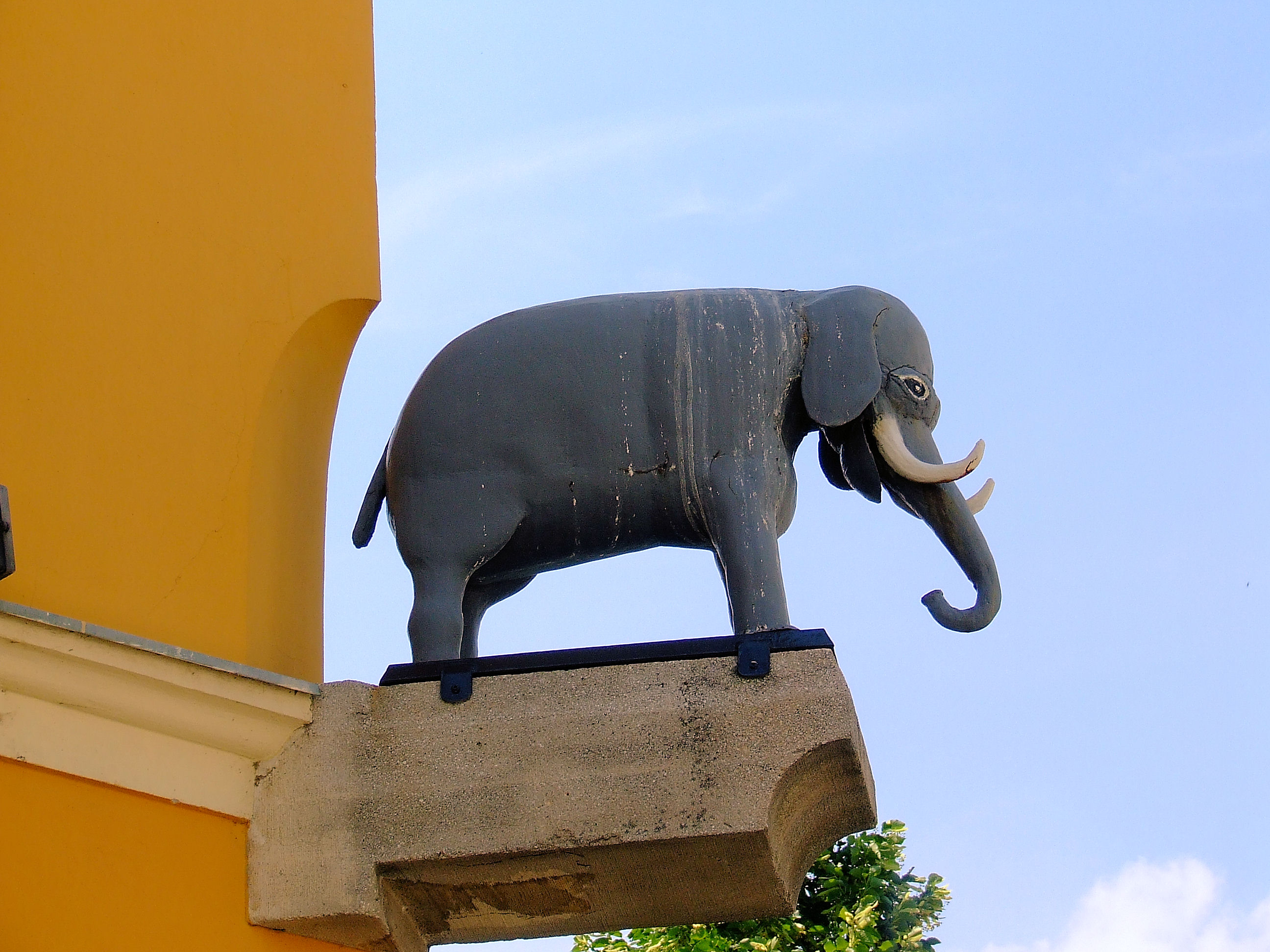 Elefánt szobra a pécsi Elefántos Házon